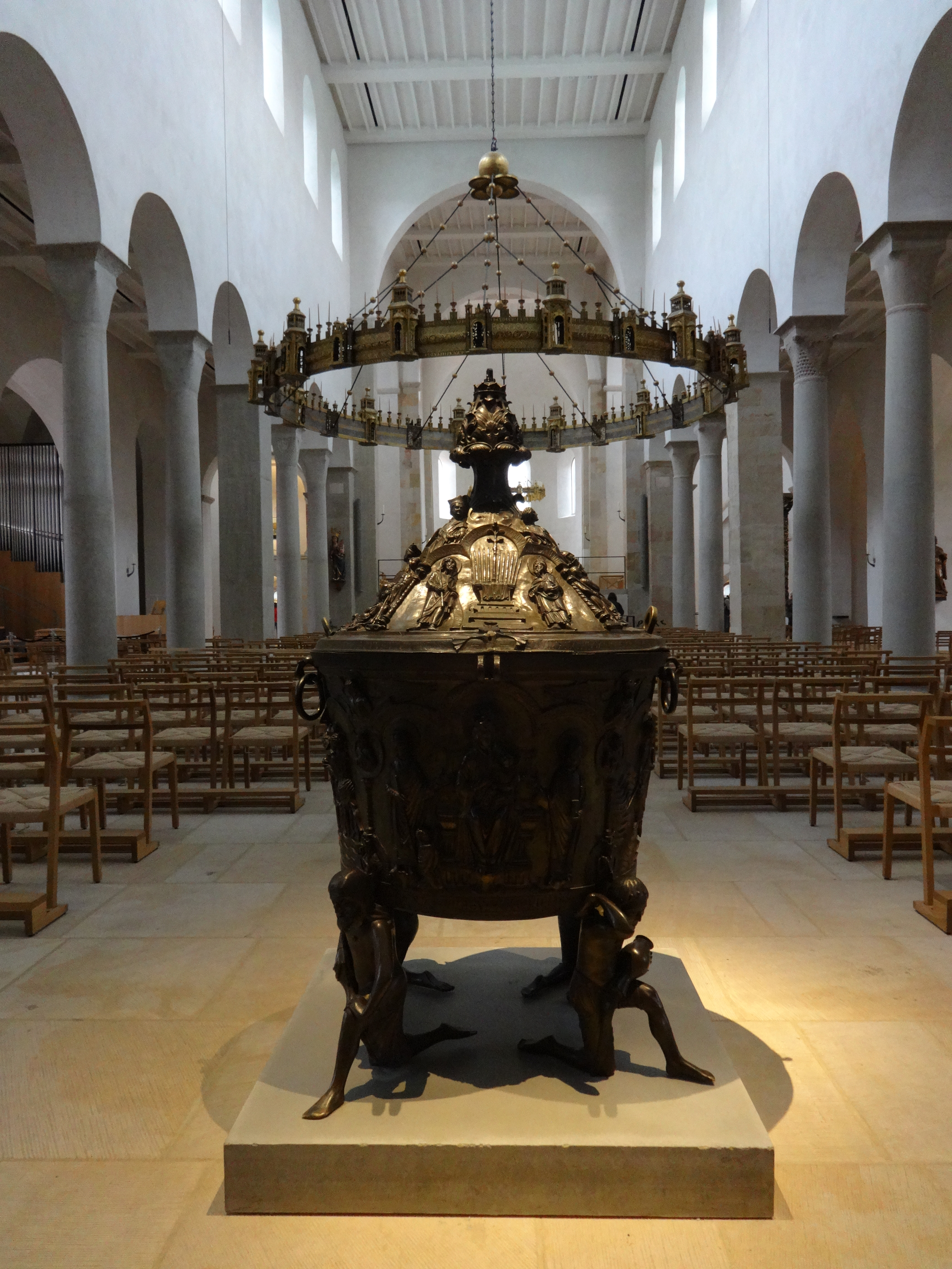 Hildesheimer Dom, Inneres, Bronzetaufe und Heziloleuchter